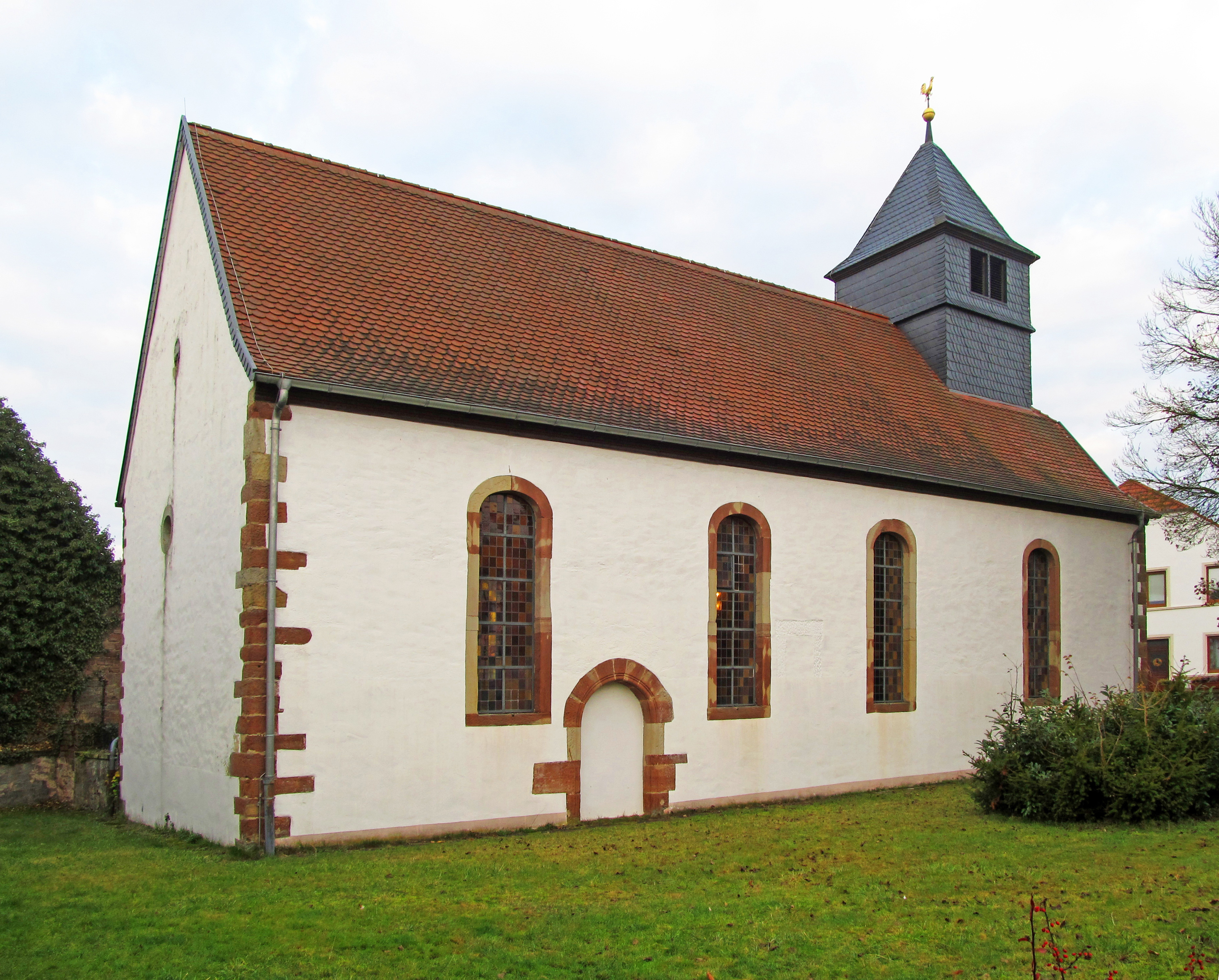 Die protestantische Kirche in Breitfurt, einem Stadtteil von Blieskastel, Saarland